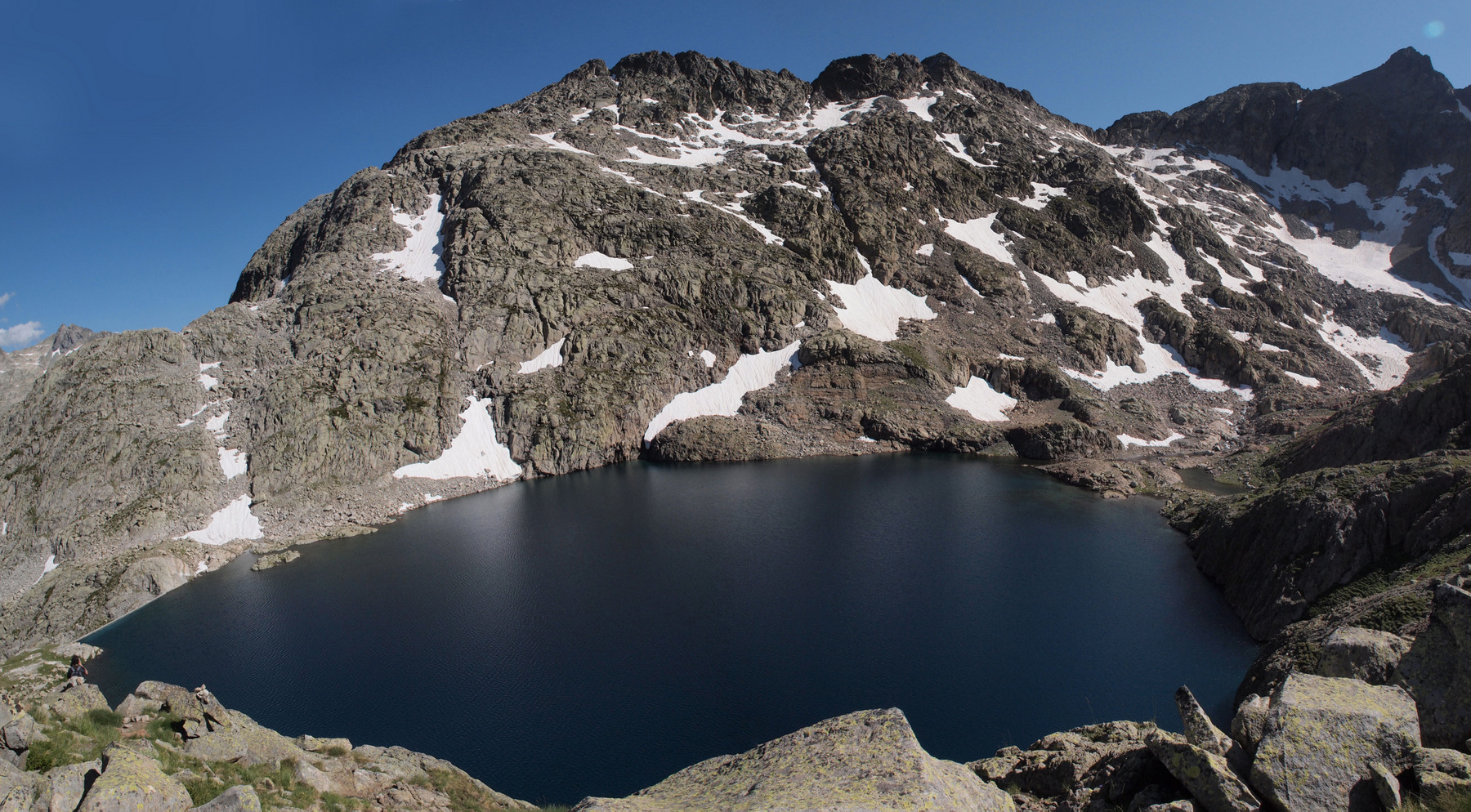 Puertos de Panticosa, Bramatuero y Brazatos This is a photography of a Site of Community Importance in Spain with the ID: ES2410040. Natura2000 entry, EEA entry